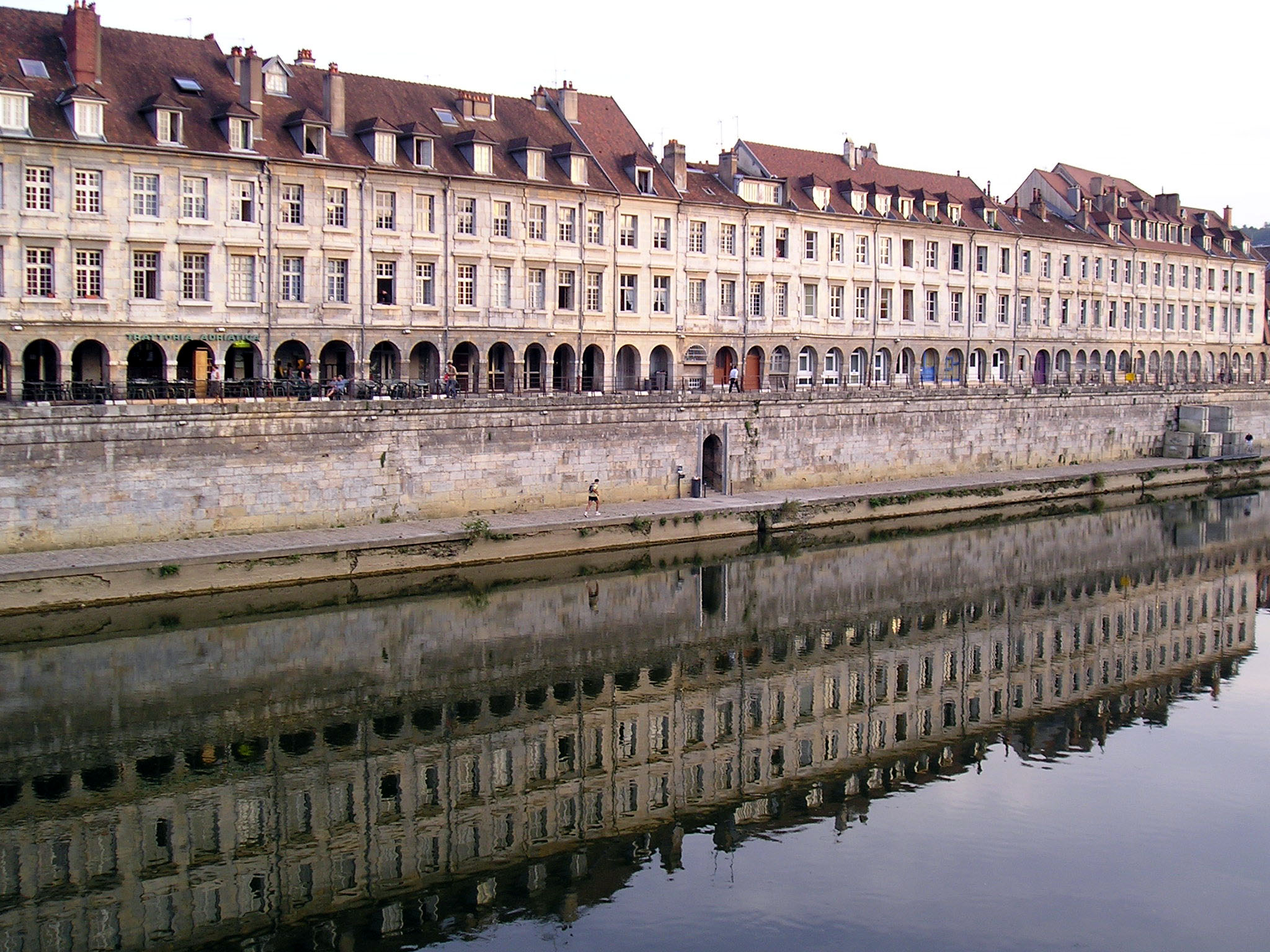 Ensemble architectural du Quai Vauban à Besançon